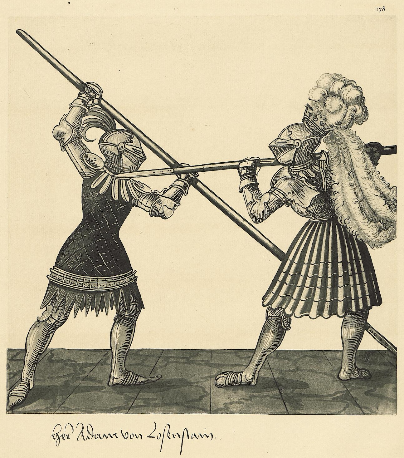 Tafel aus: Freydal: des Kaisers Maximilian I. Turniere und Mummereien; mit einer geschichtl. Einleitung. Tafeln. Wien, 1882. Exemplar der UB Tübingen. (Faksimileedition des Turnierbuchs Freydal, Kunsthistorisches Museum Wien, Signatur: K.K. 5073) Tafel 178 Herr Adam von Losenstein